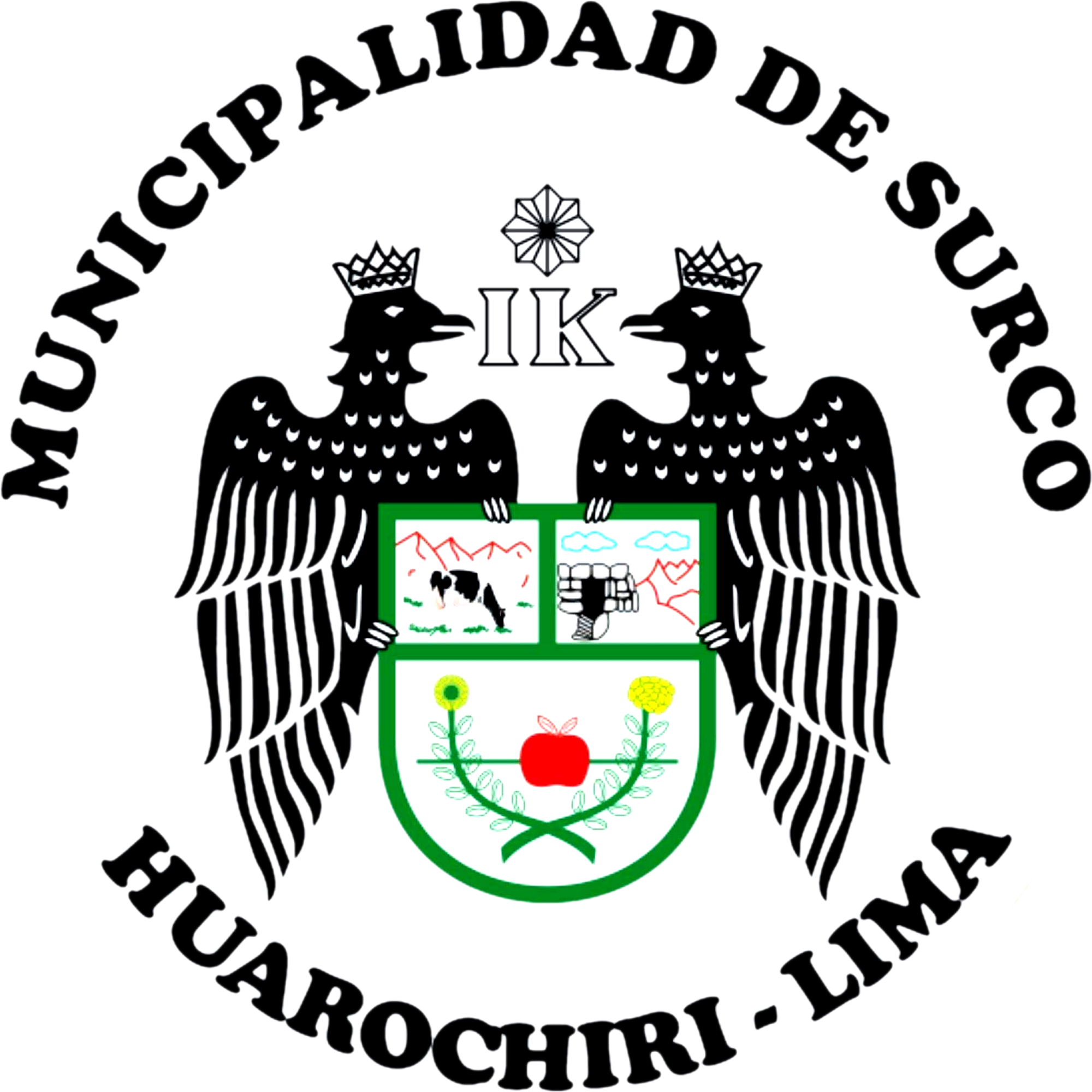 El escudo se divide en tres campos, donde la primera representa el ganado vacuno, el segundo representa un lugar arqueológico y el tercero representa la flora y fruta mas popular. En ambos lados se observan las aves coronadas, en parte superior las iniciales IK. Por último se lee el título en mención al distrito.